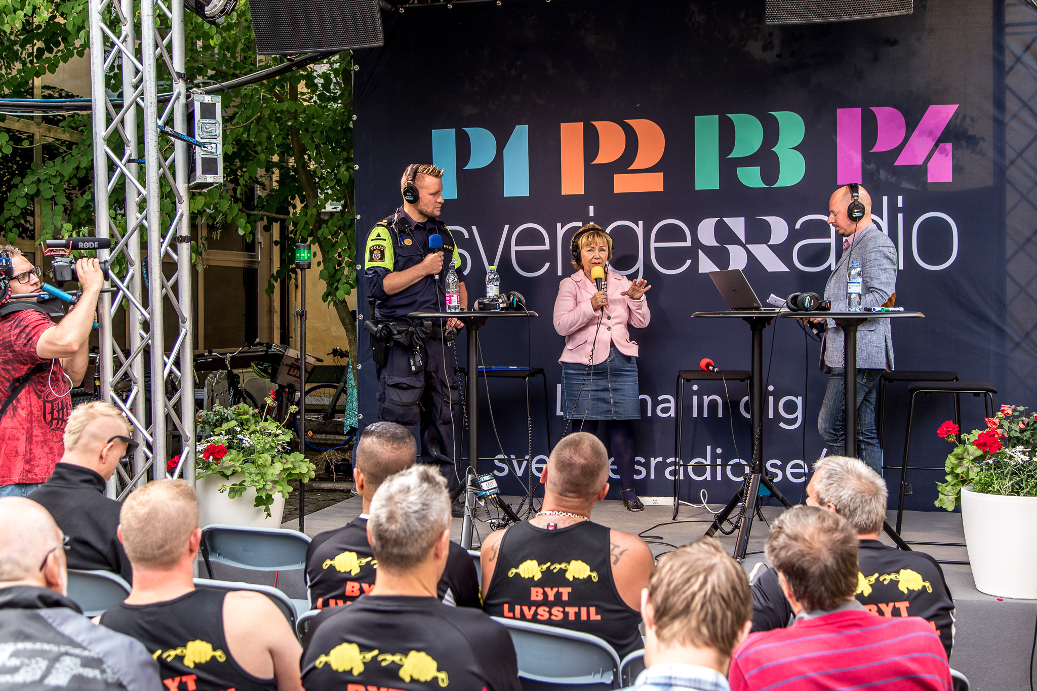 Viktor YB Södermalms polisen och Beatrice Ask intervjuas i Sveriges Radio